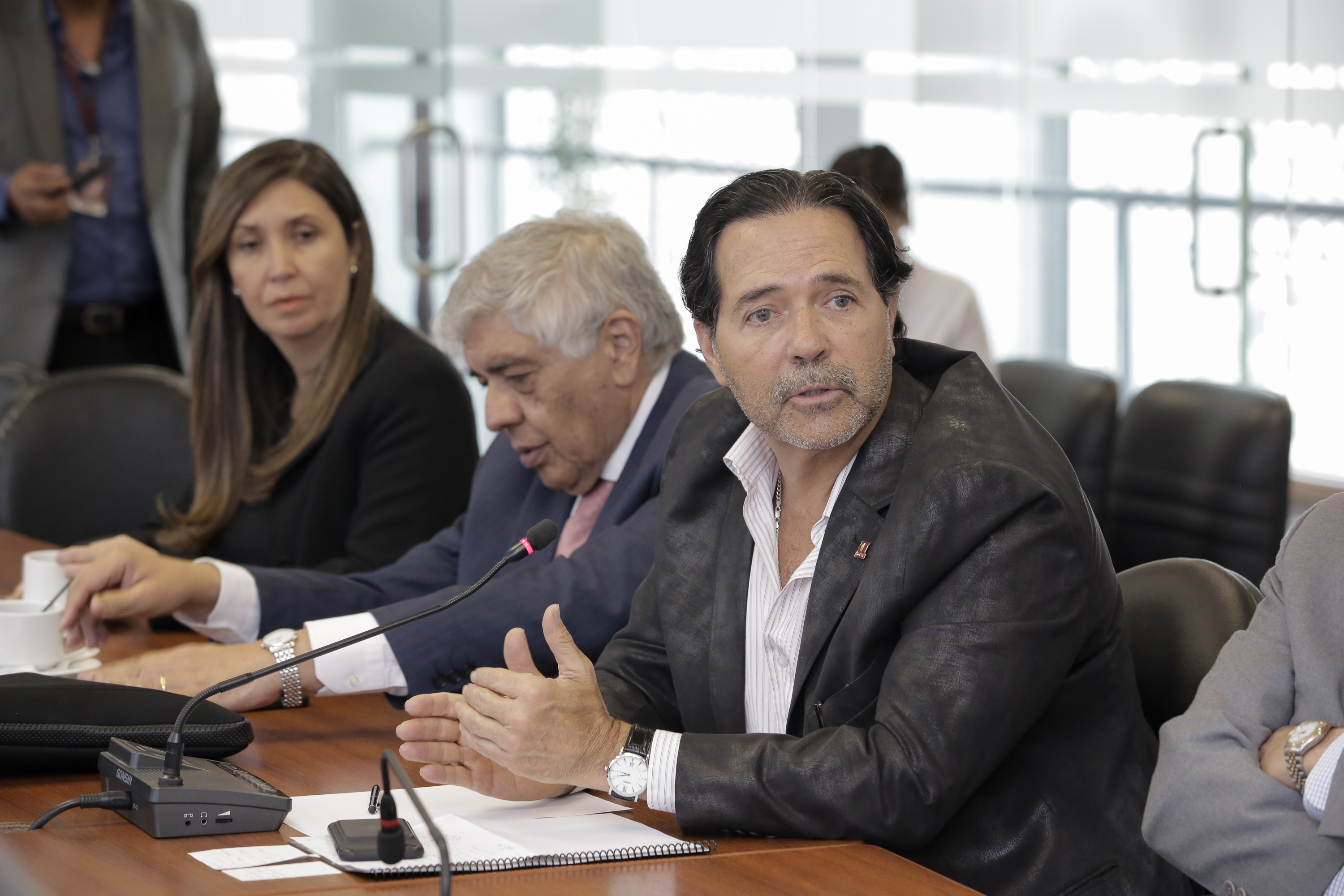 13 de junio de 2017 - Augusto Espinoza se reune con representantes de Universidades Autofinanciadas Tema: Augusto Espinoza se reune con representantes de Universidades Autofinanciadas. Fotografía: Alberto Romo/Asamblea Nacional